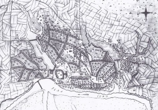 Крычаў. План 1788 г. (РДВГА)